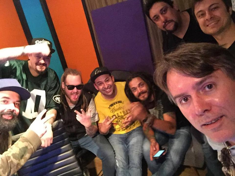 Durante as gravações do single O MAR PRO SONHADOR em São Paulo no estúdio RootSans do Rodrigo Sanches.